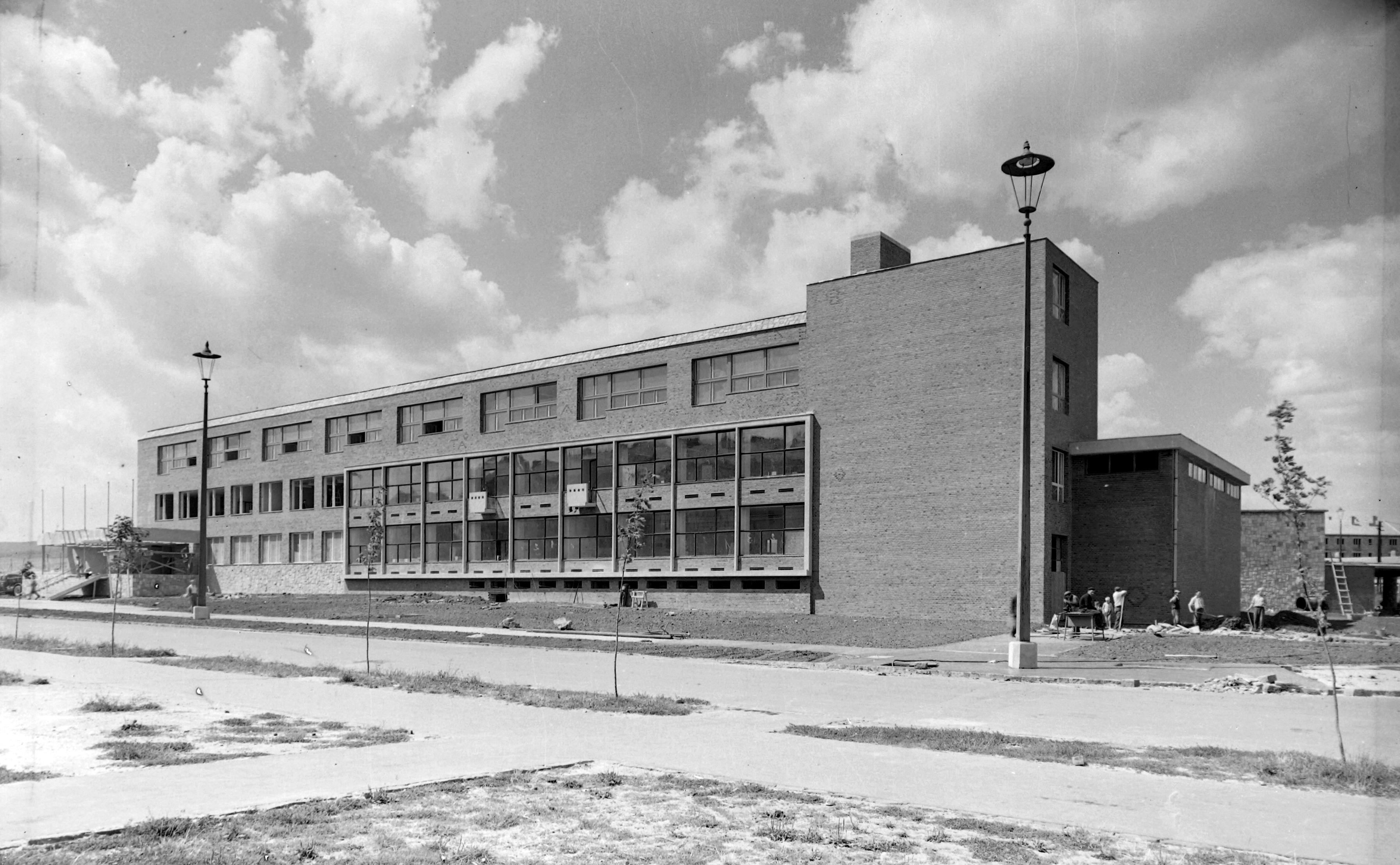 Egressy Béni (Lenin) út 1 most Lini István tér, 1-2. Irinyi János Vegyipari Technikum. - 'A Vegyipari Technikum 1950 szeptemberében alakult Hatvanban, két idõsebb elõd fokozatos megszüntetésével egy idõben. Kazincbarcikára 1956 szeptemberében költözött és ideiglenesen a BVK volt rendészeti laktanyájában folyt a tanítás.' Location: Hungary, Kazincbarcika Tags: school Title: Egressy Béni (Lenin) út 1. Irinyi János Vegyipari Technikum.